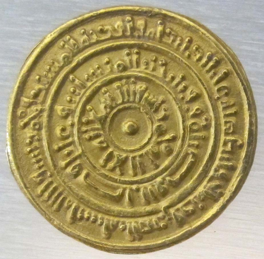 Egitto, califfo al mustansir, dinar fatimide, 1035-1094